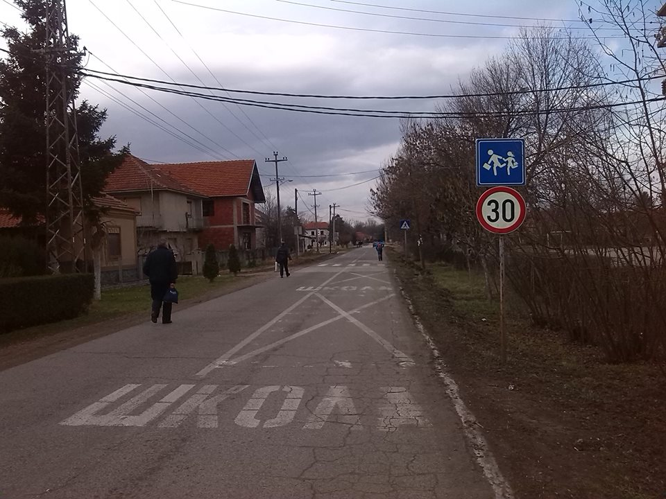 Donja Trnava, glavna ulica